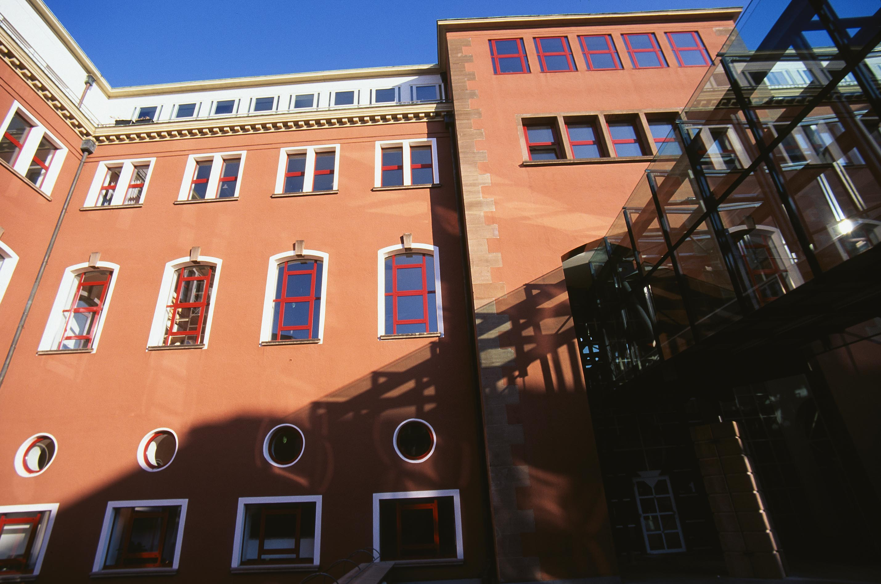 University of Applied Sciences Stuttgart, Hochschule für Technik Stuttgart